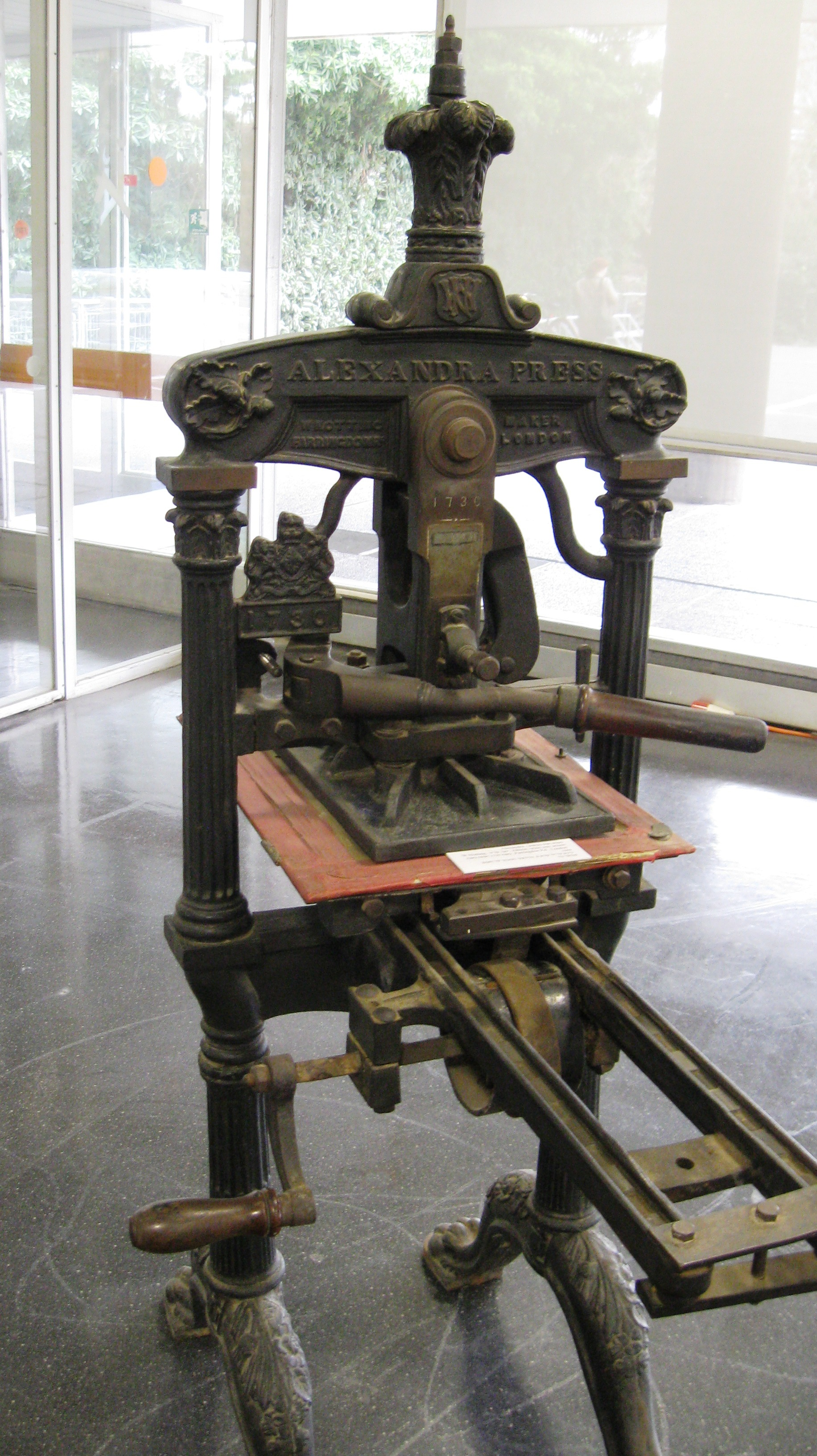 מכונת דפוס עתיקה רישיון נוצר על ידי משתמש:Daniel Ventura